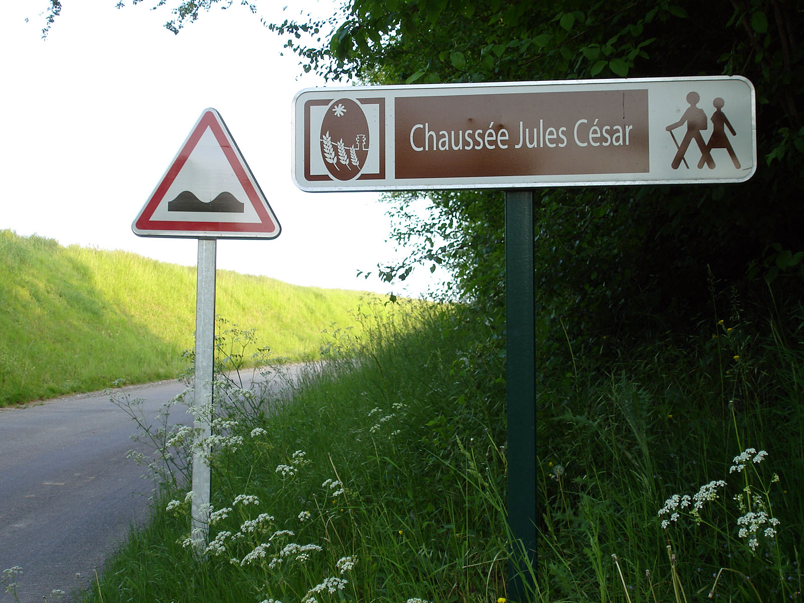 Panneau signalant la chaussée Jules César (invisible sur la photo) sur le plateau du Vexin à Courcelles-sur-Viosne, Val-d'Oise, France.